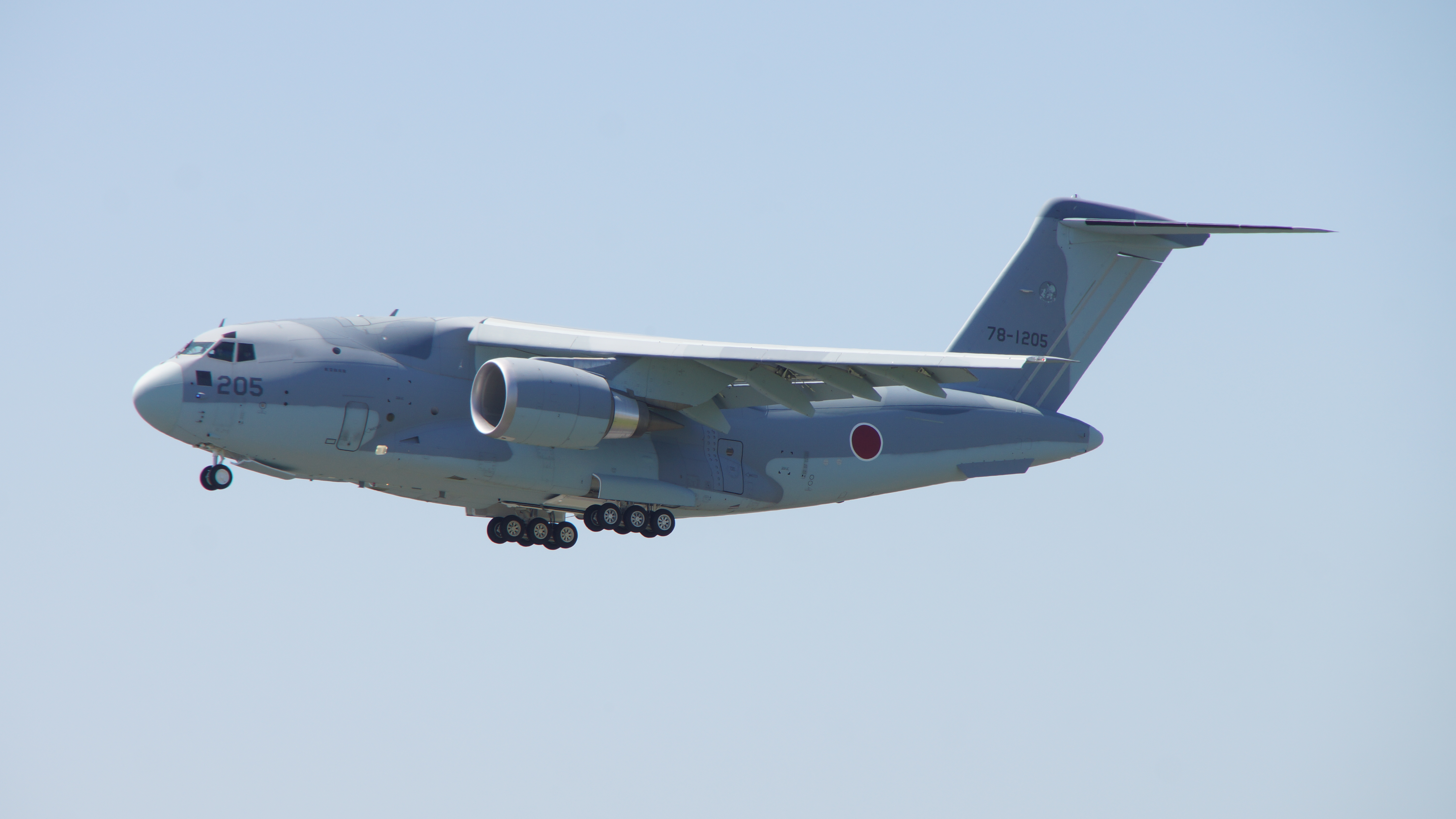 航空自衛隊 C-2輸送機（78-1205号機） 飛行中。2017年5月28日 美保基地にて。